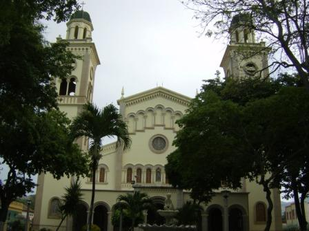 Vista frontal del templo